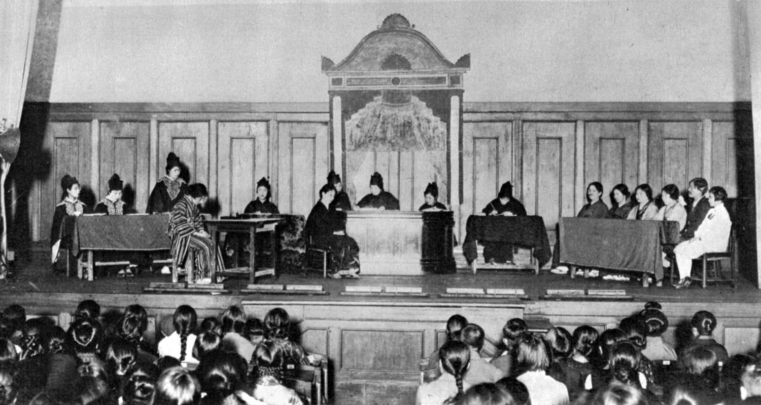 明治大学女子部の授業で行われた模擬裁判の様子